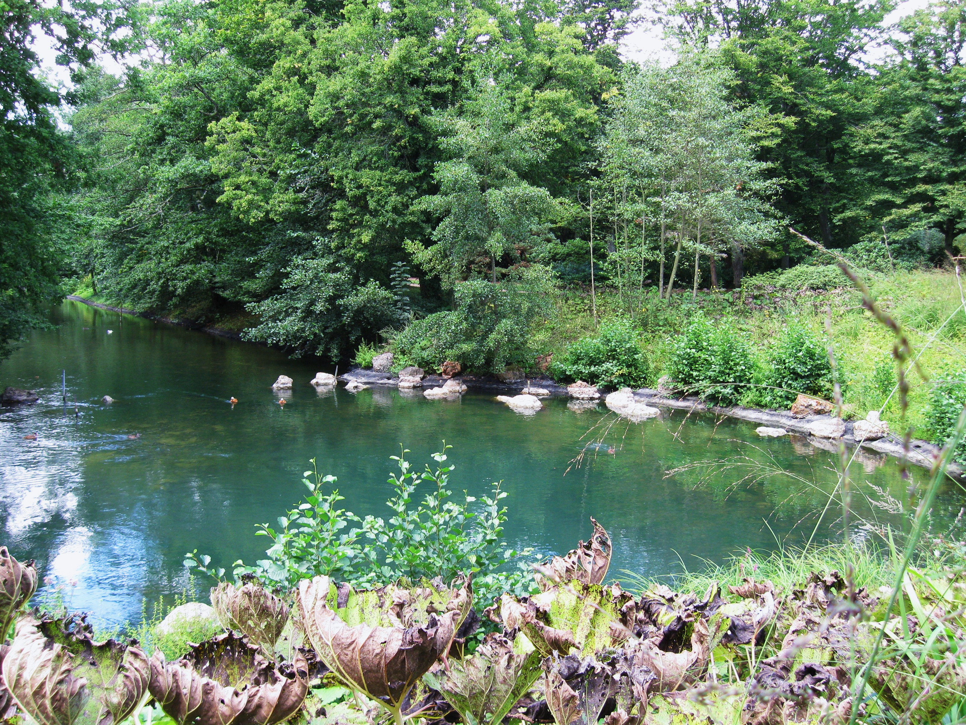 résurgence karstique de la Loire, après un parcours souterrain de plusieurs kilomètres. C'est la source del la rivière Loiret dans le Parc Floral de la Source en Orléans, département Loiret, France.